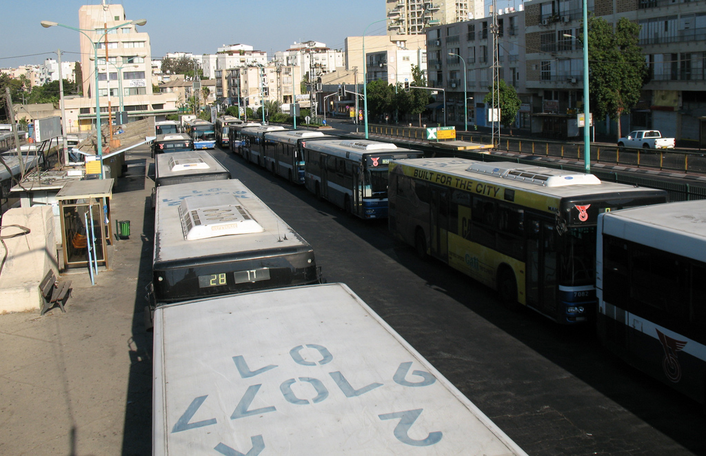 Petah Tikva Central Bus Station